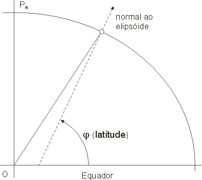 Latitude geodésica